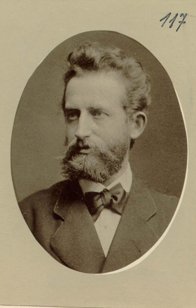 Danish entomologist Anders Bang-Haas (1846-1925)